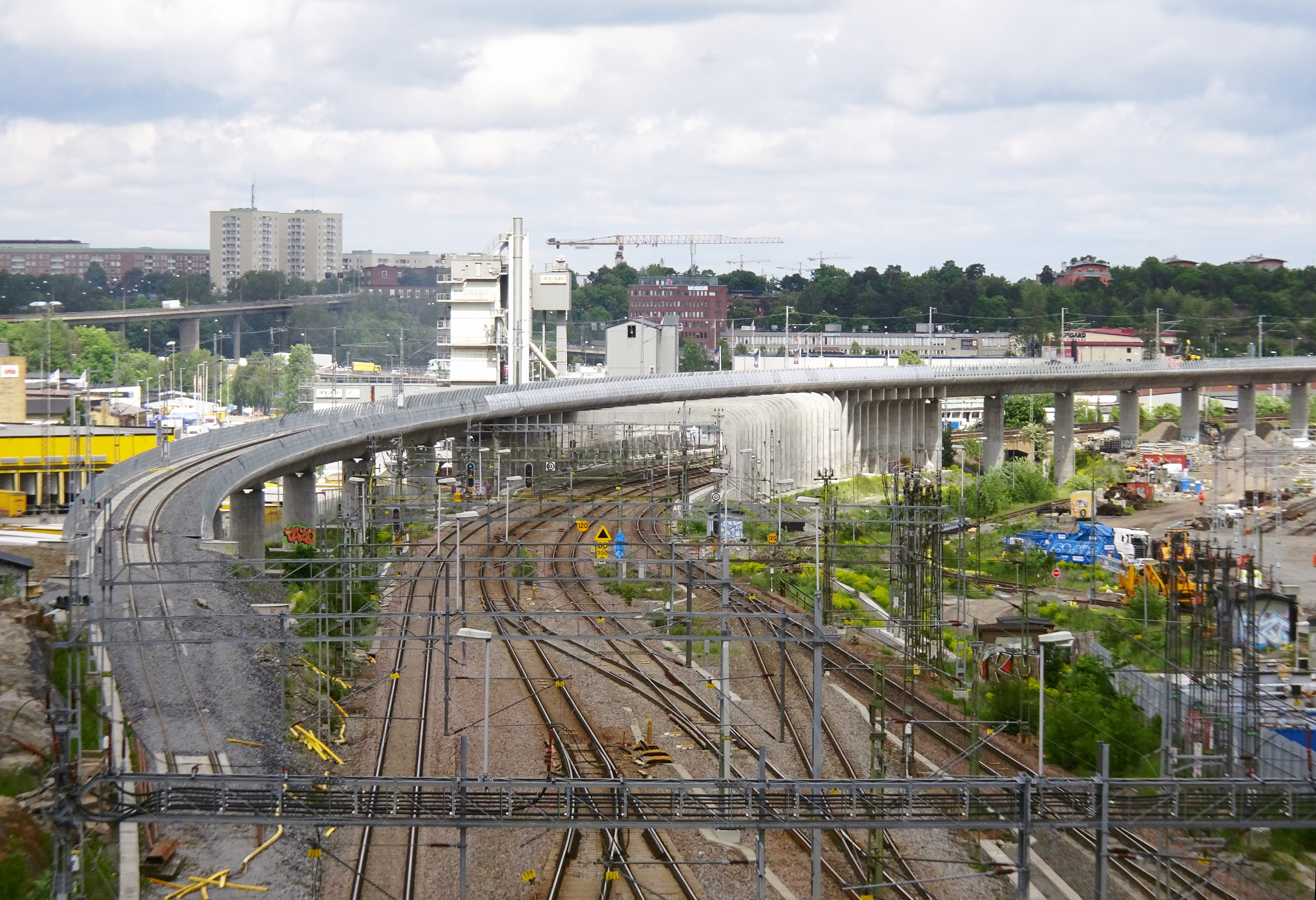 Älvsjöbågens södra avsnitt vid Västberga industriområde